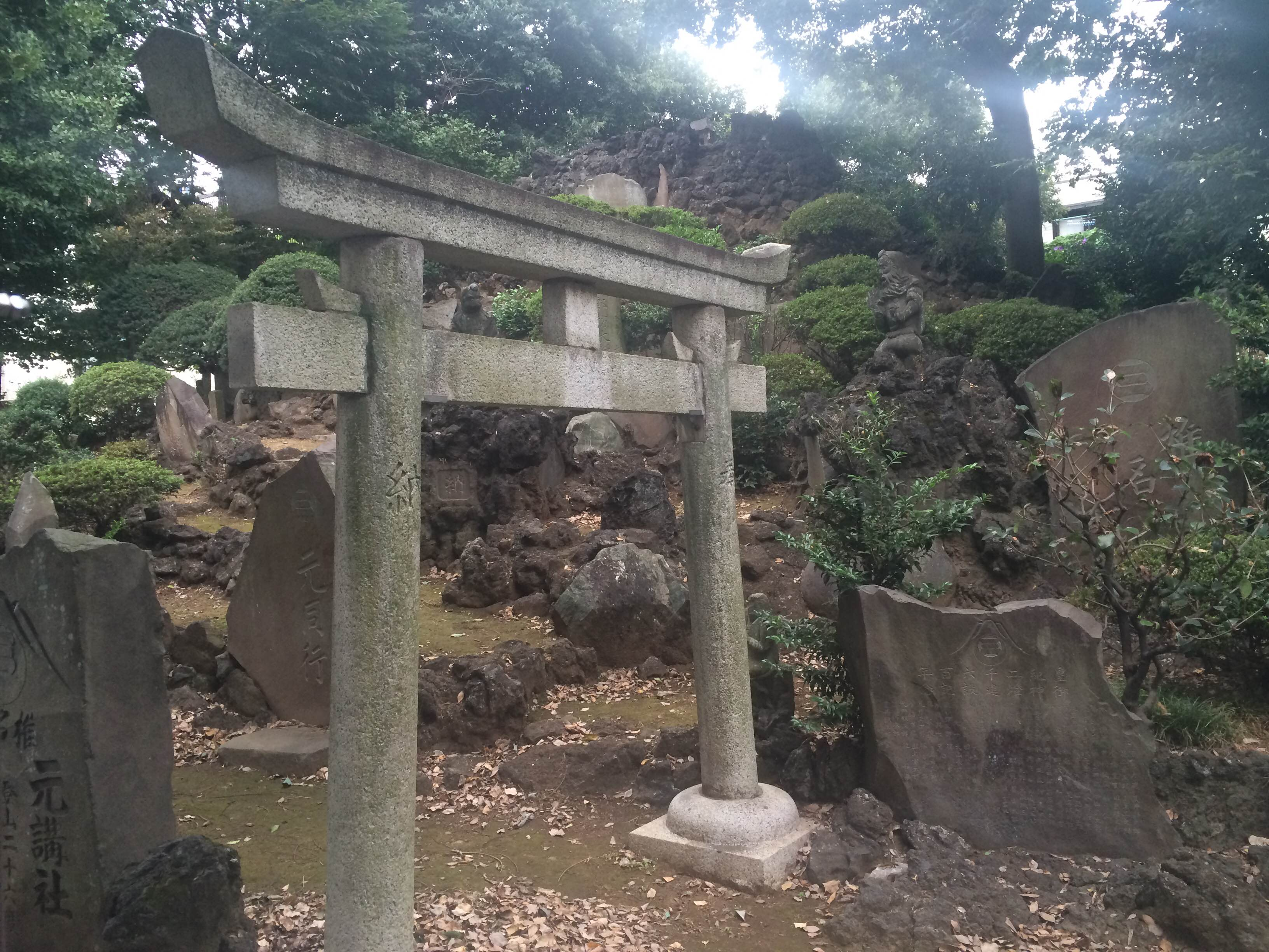 東京都豊島区高松の富士浅間神社境内にある重要有形民俗文化財の「豊島長崎の富士塚」。